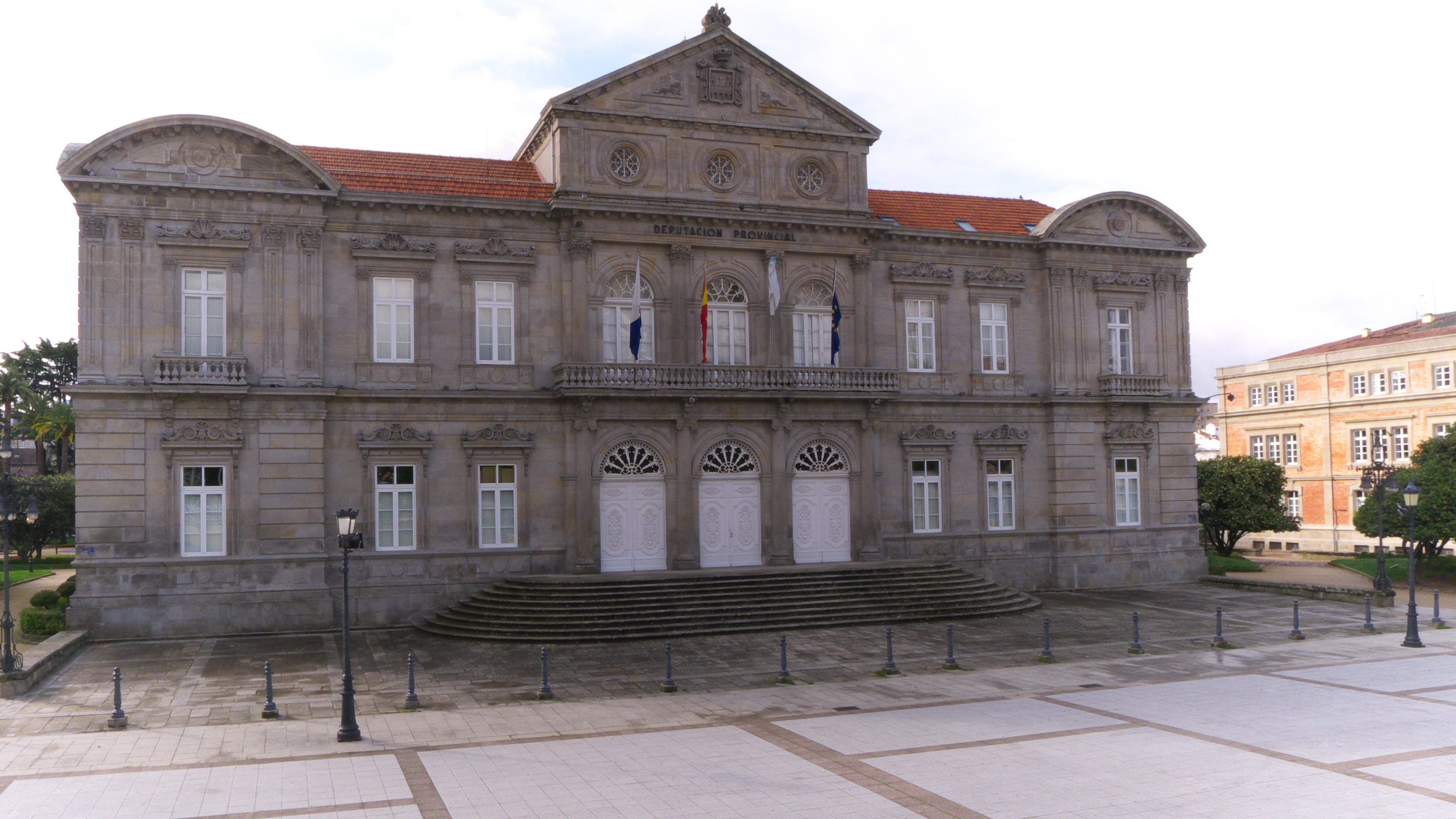 Arquitectura ecléctica de Alejandro Rodríguez-Sesmero González (1848-1913). Edificio, hoy sede de la Diputación Provincial, construido entre 1884 y 1890.